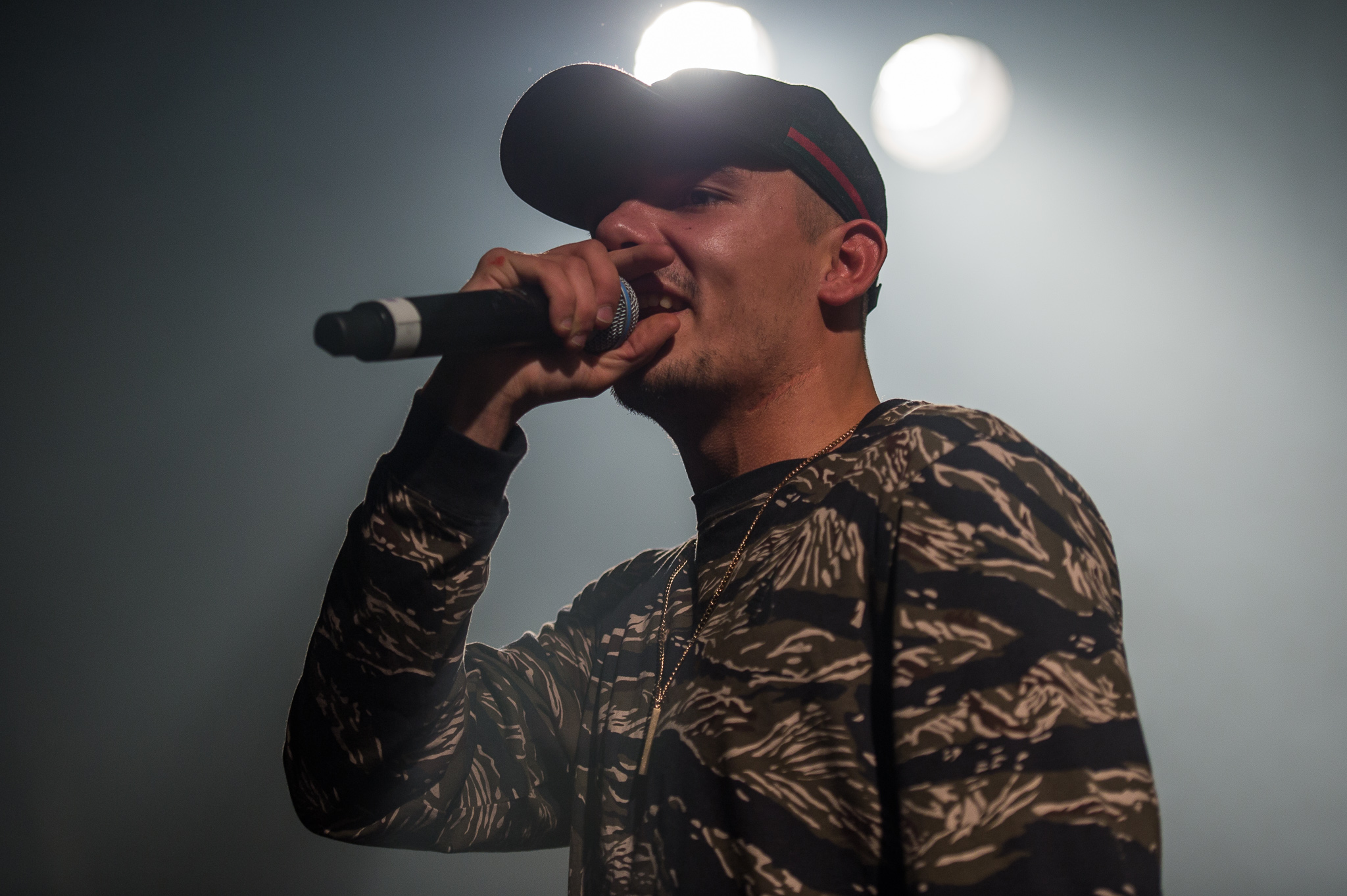 Capital Bra,Concertbüro Franken,Der Hirsch,Konzert,Livekonzert,Livemusik,Musik,Vladislav Balovatsky